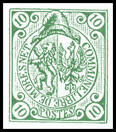 "Марка" виртуального государства Моресне